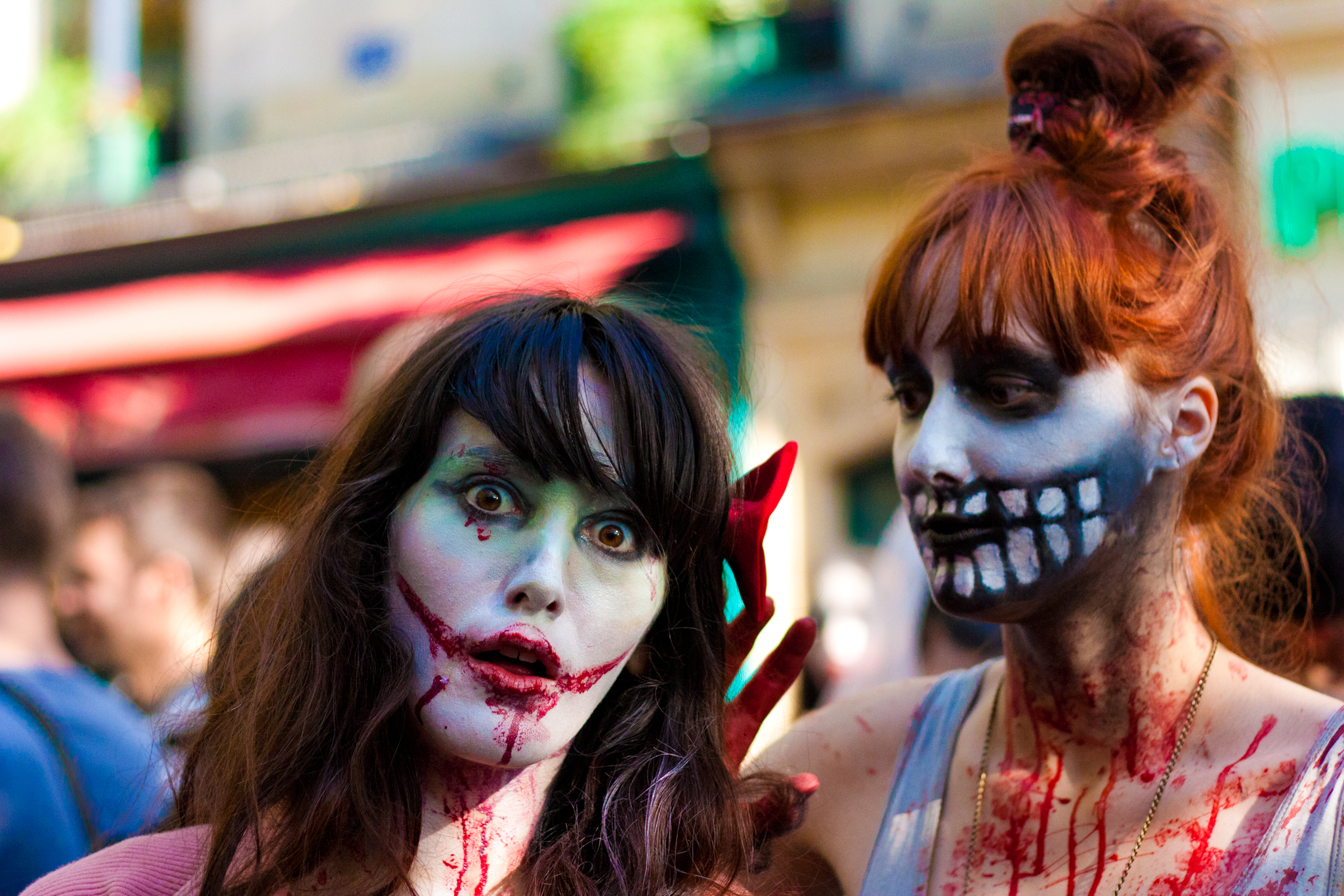 Paris Zombie Walk 2011.